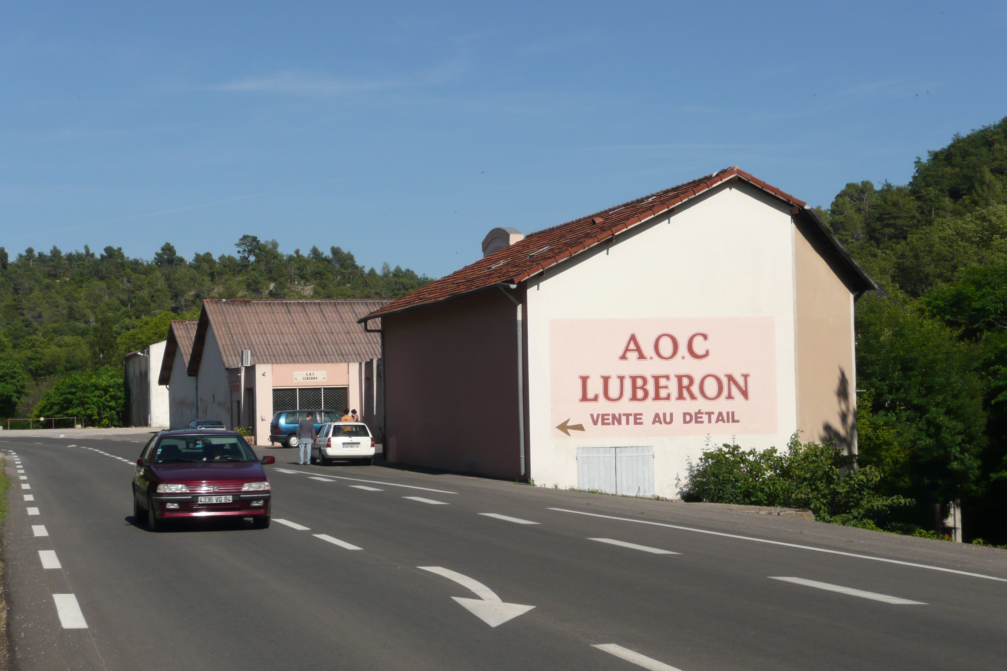 Cave des vignerons à Grambois.